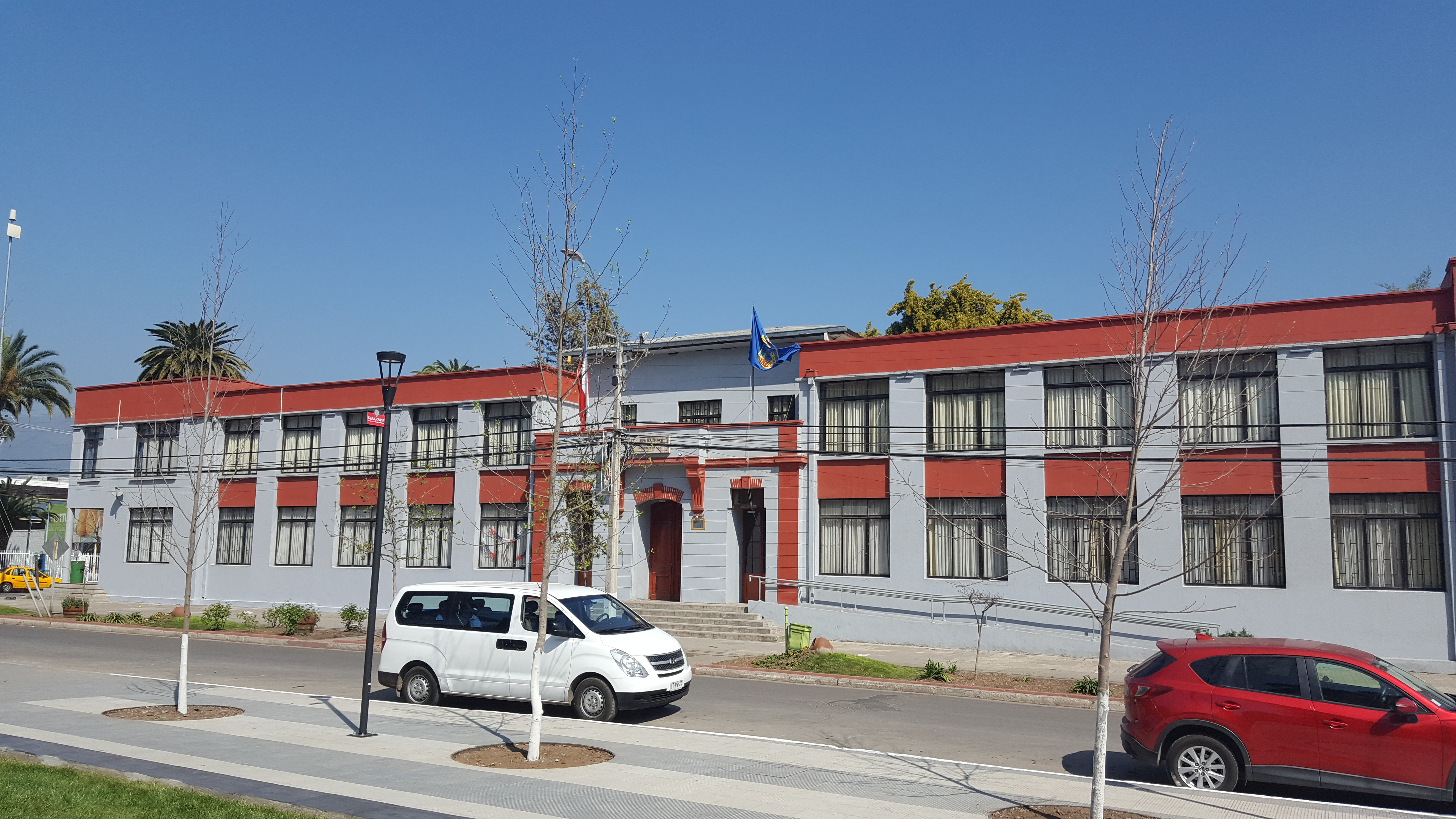 Frontis del Liceo Tomas Marín de Poved, en Rengo